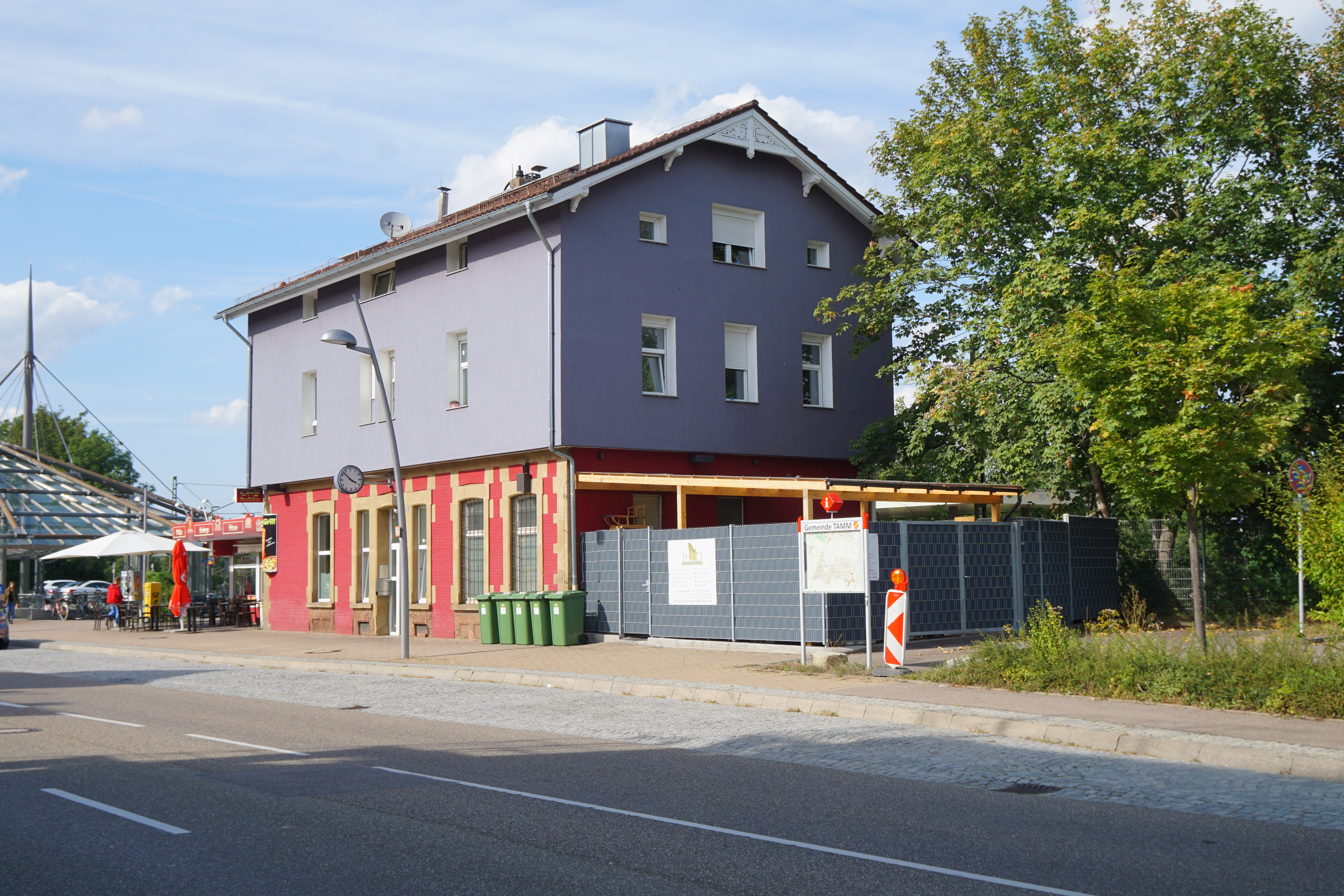 Der Bahnhof Tamm ist ein Teil der Frankenbahn.